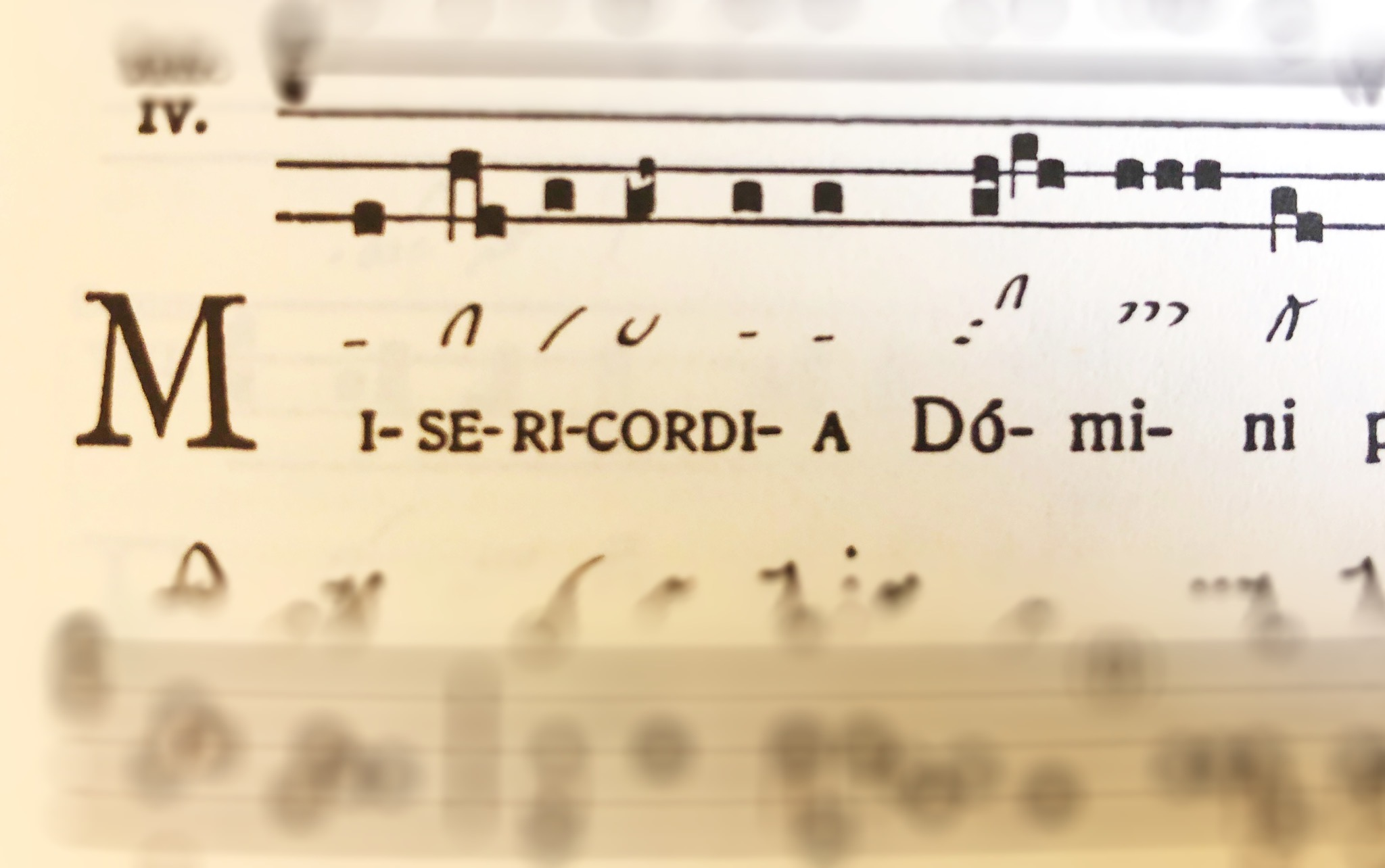 Inizio introito Misericordia Domini